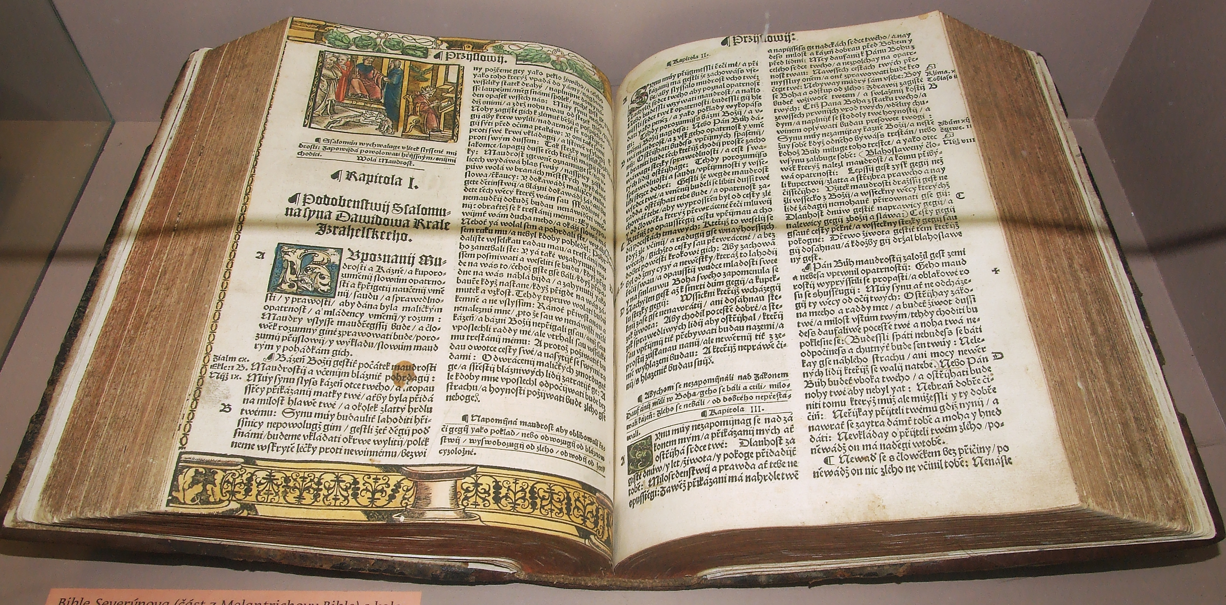 Bible Severýnova (1537) - Regionální muzeum Náchod